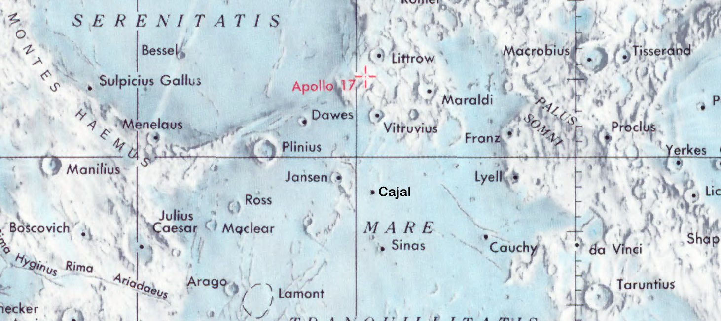 Cráter lunar Cajal. Localización. (Lunar Chart LPC1. Second Edition)